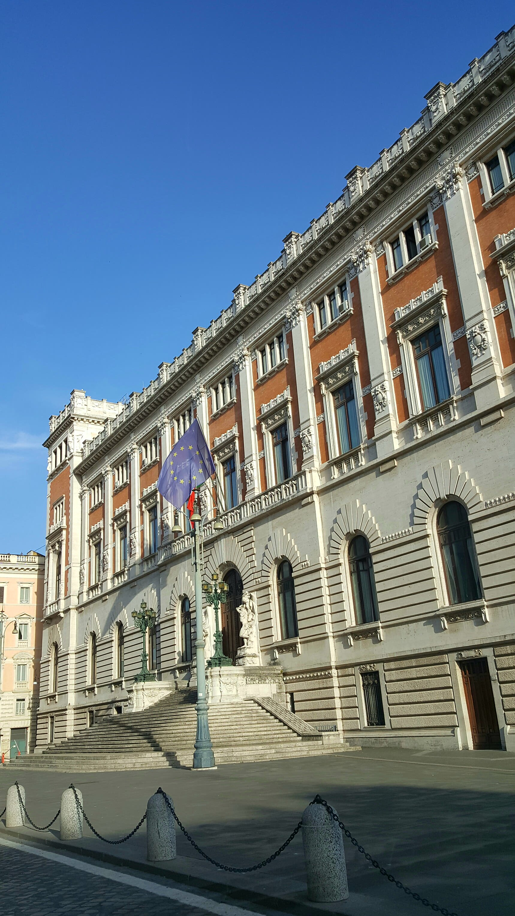 Ingresso principale della Camera dei Deputati a Roma, Piazza del Parlamento.